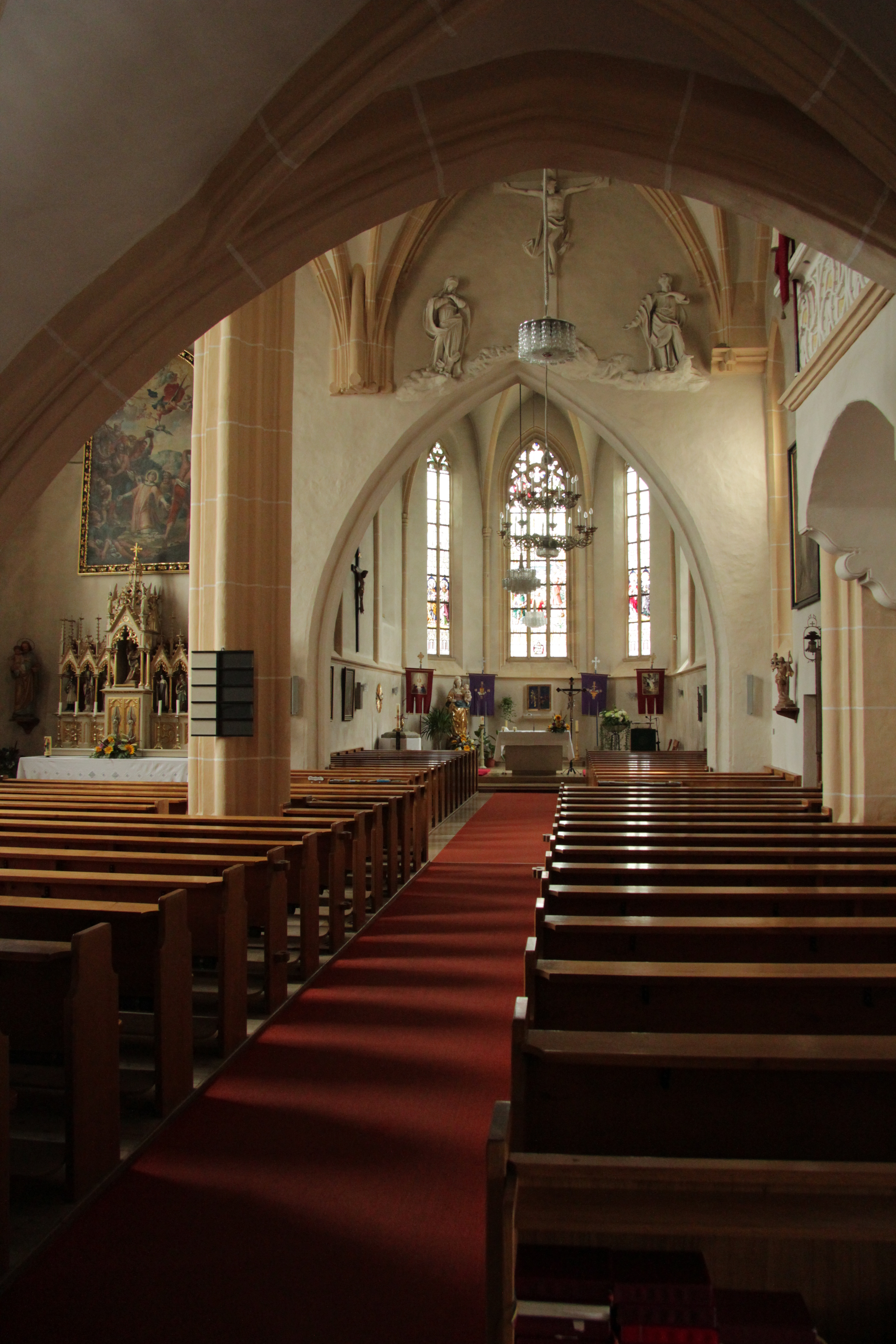 Kath. Pfarrkirche hl. Stephan